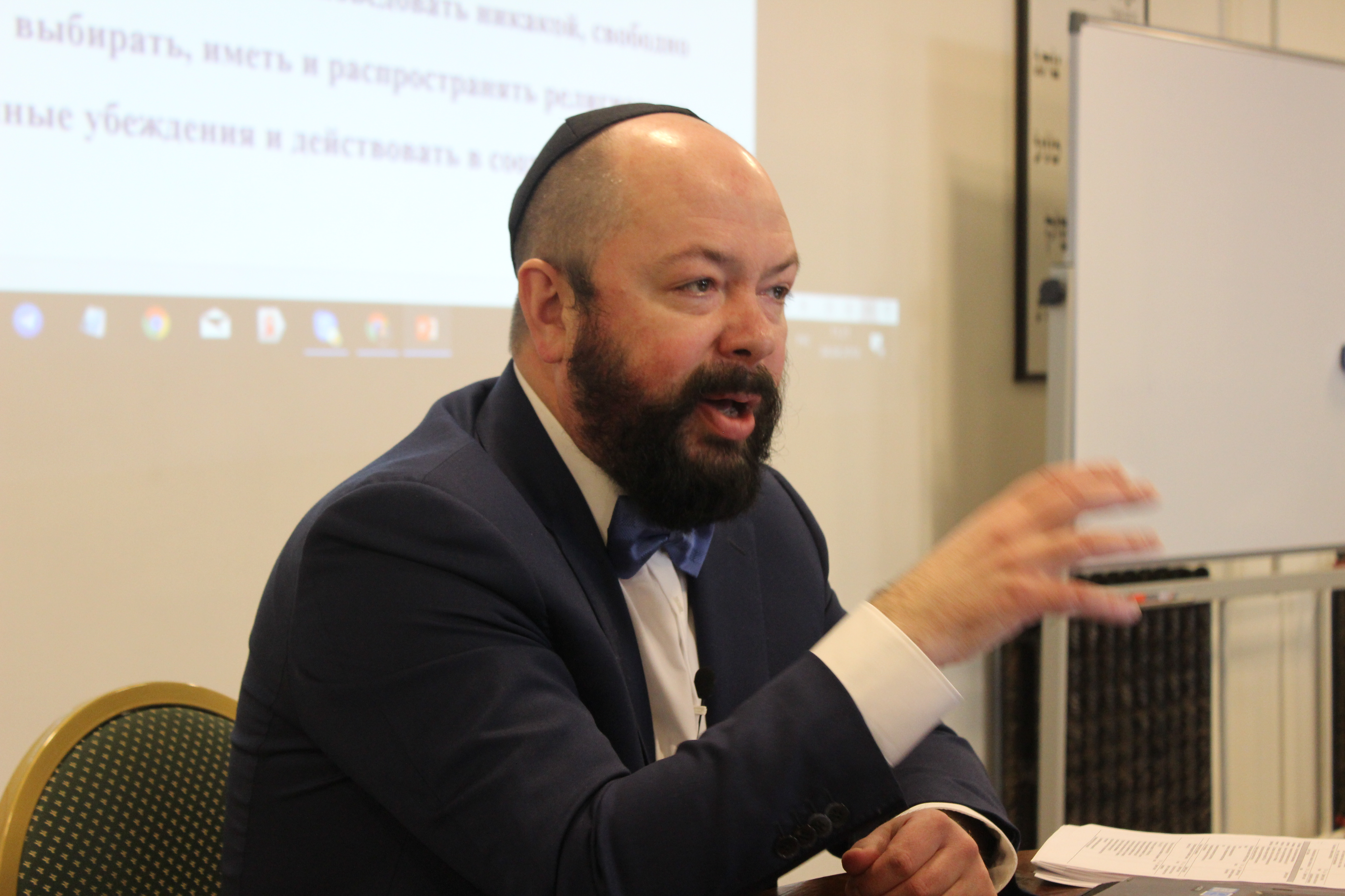 Константин Андреев проводит семинар по "Закону Яровой" в московском "Каббала Центре" в марте 2018 г